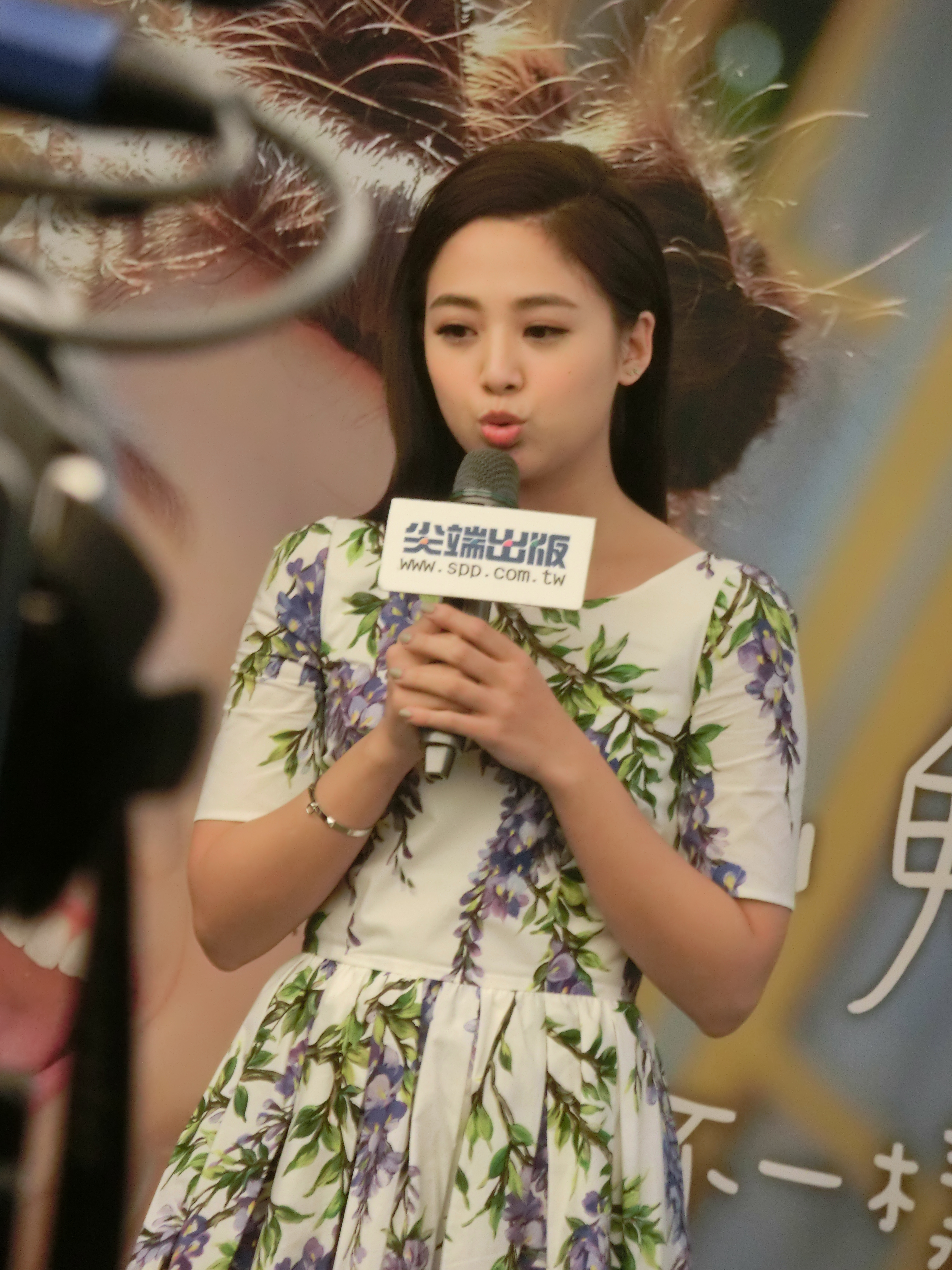 尖端出版吳映潔寫真書《鬼鬼╳吳映潔 不一樣的鬼鬼》台北簽書會